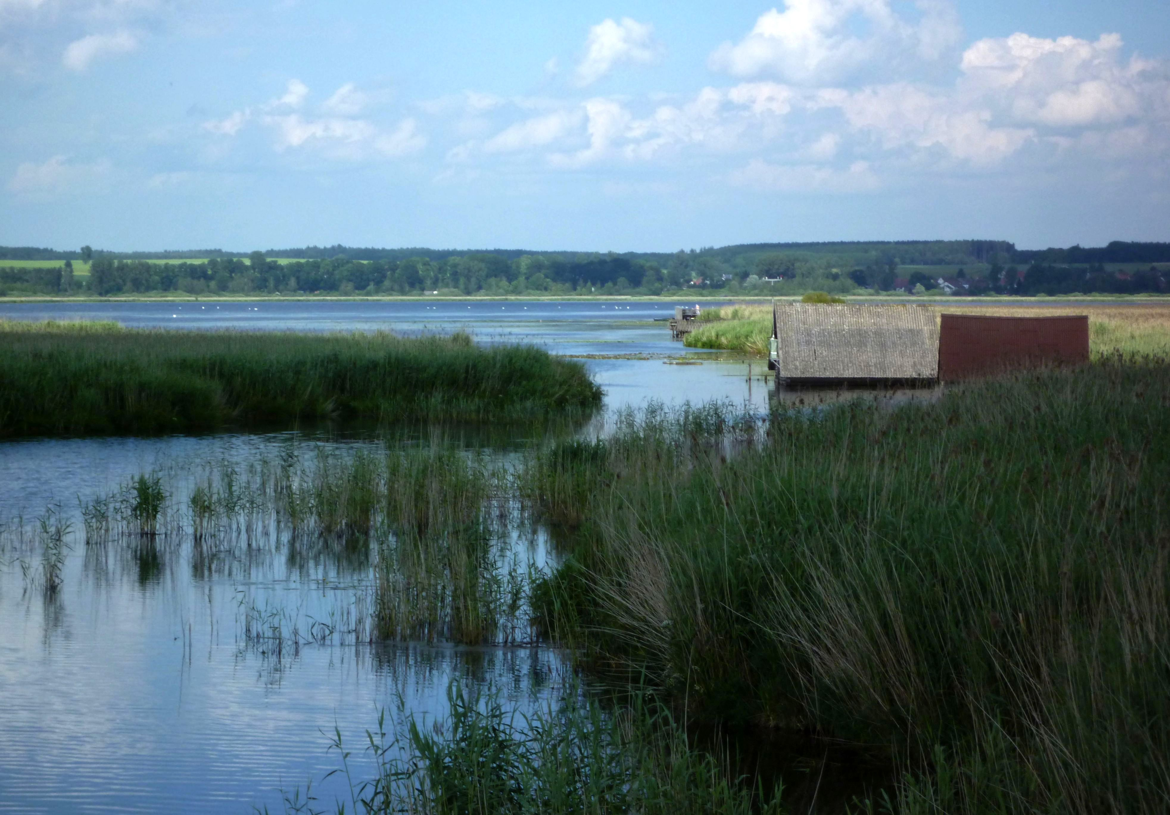 Bad Buchau - Wolken über dem Federsee